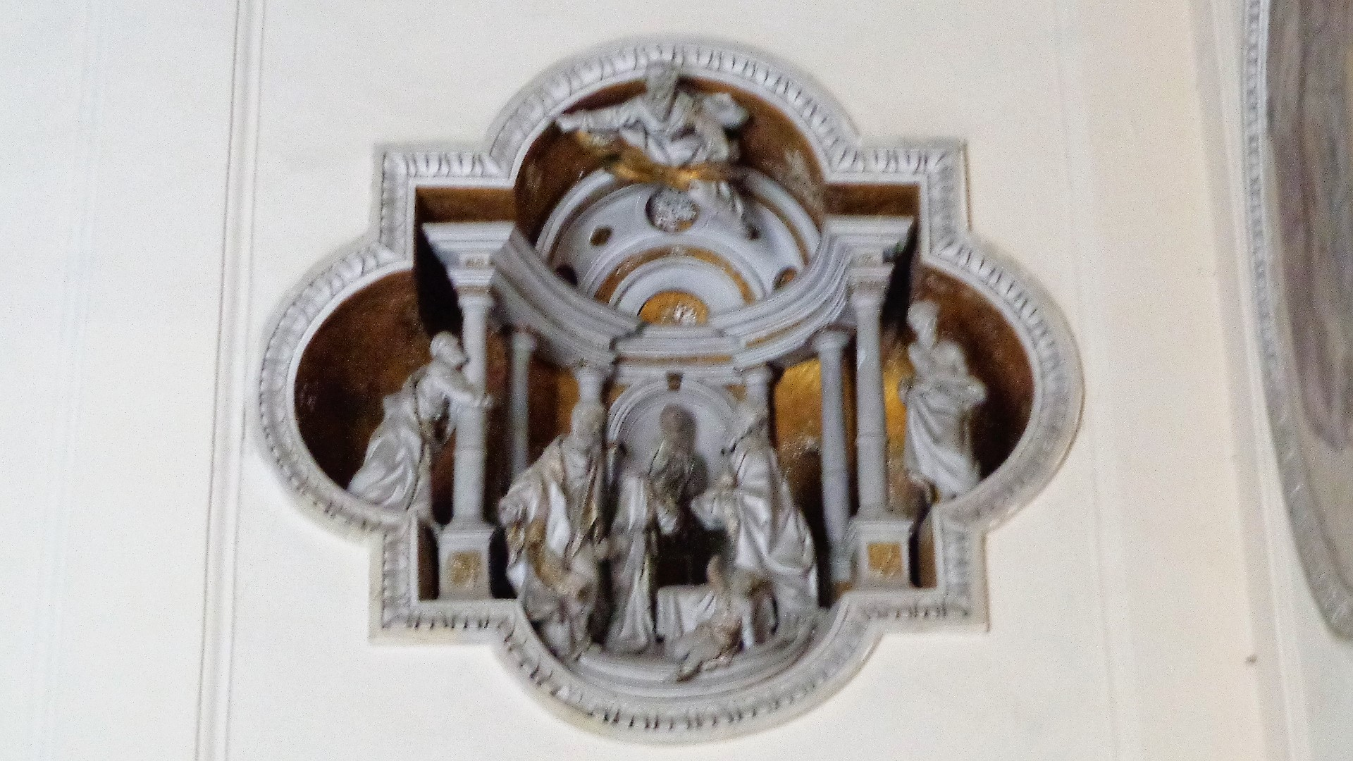 Teatrino raffigurante la Presentazione al Tempio, attribuzione d'opera presente nella sacrestia o Cappella delle sorelle Spatafora della chiesa della Madonna di Monte Oliveto.